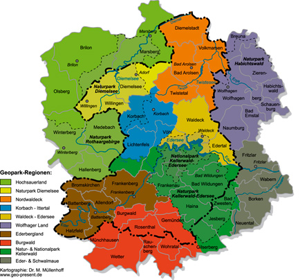 Karte der 10 Geoparkregionen